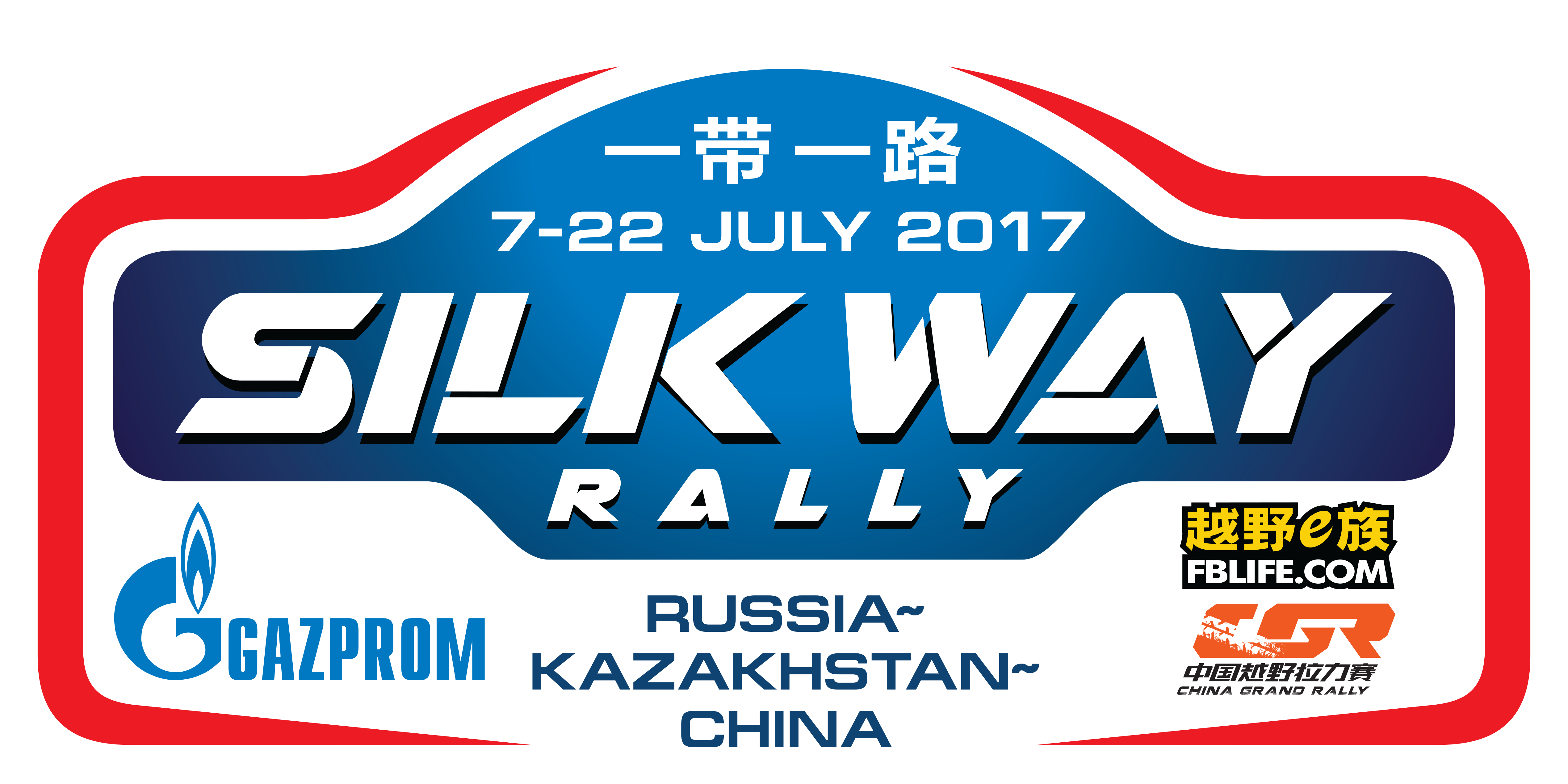 Официальный логотип гонки 2017 года